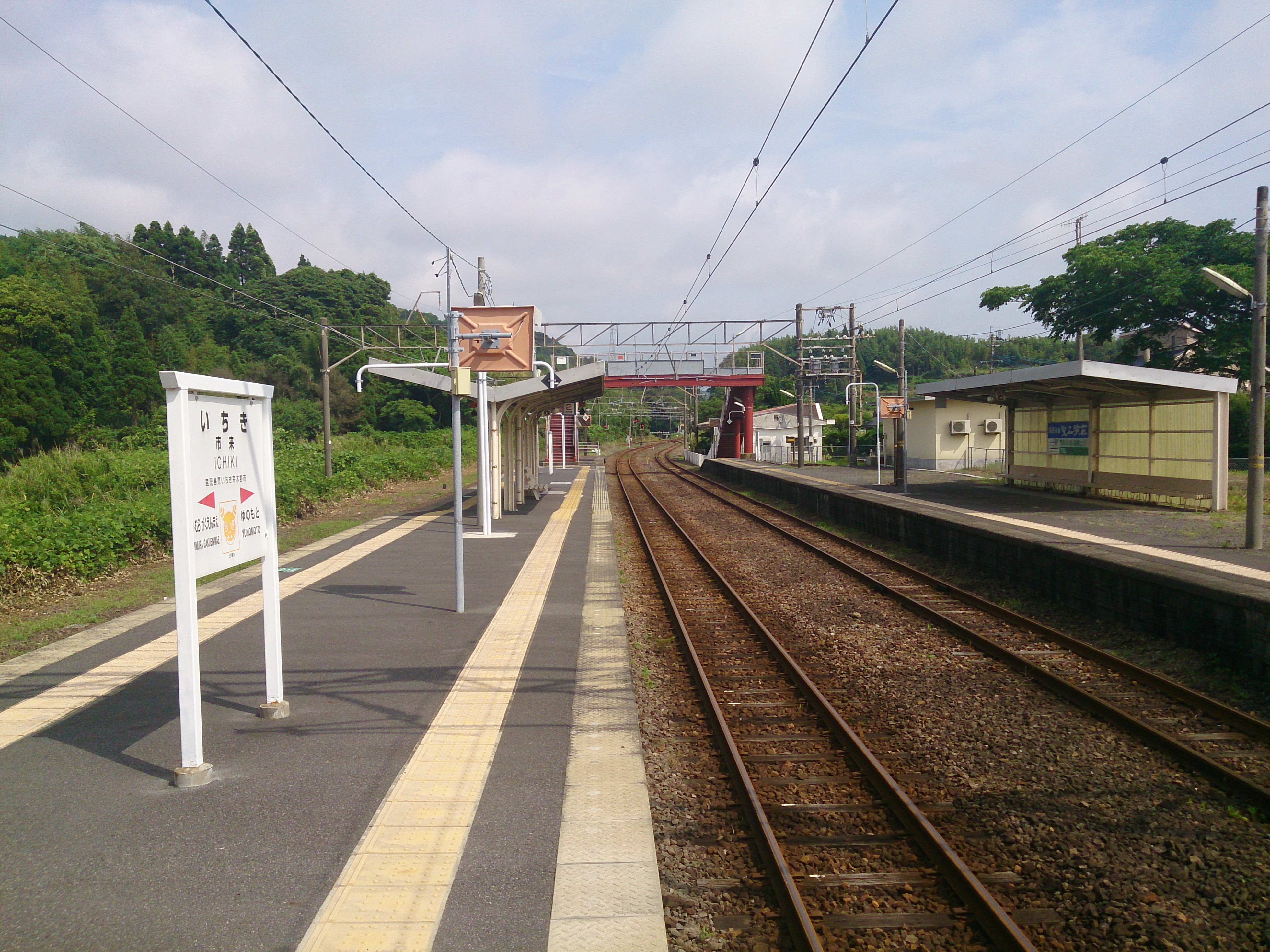 市来駅ホーム